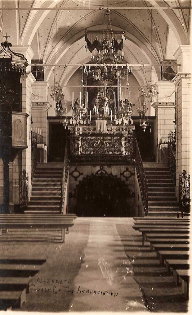 Nazareth